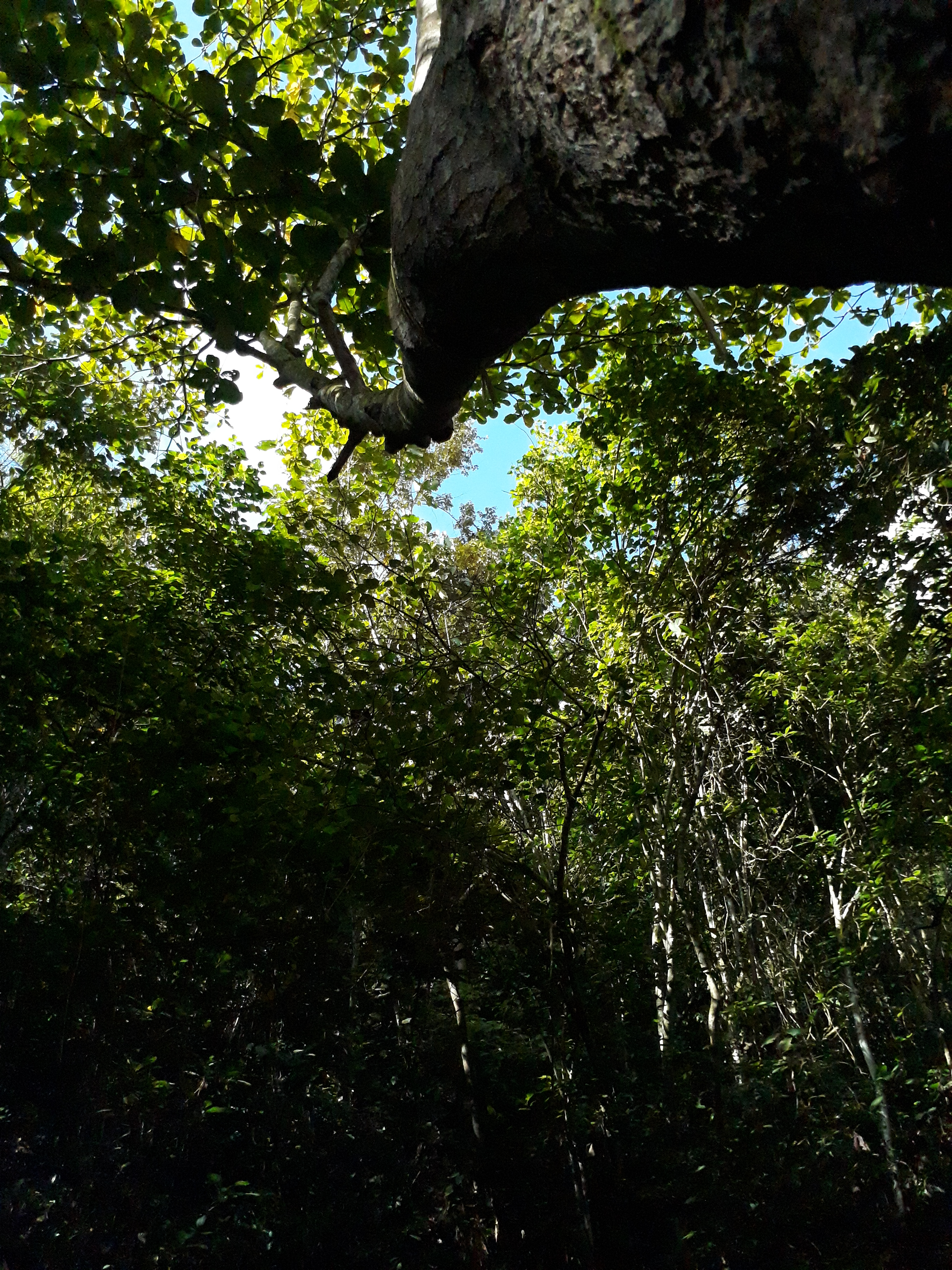 Hutan berambai adalah hutan sekunder yang dijadikan wosata, tapi dibalik keindahan air terjunnya terdapat bentang alam yang sangat indah.